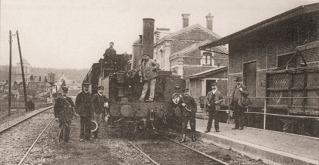 Gare de Saint-Saëns - Un train au départ